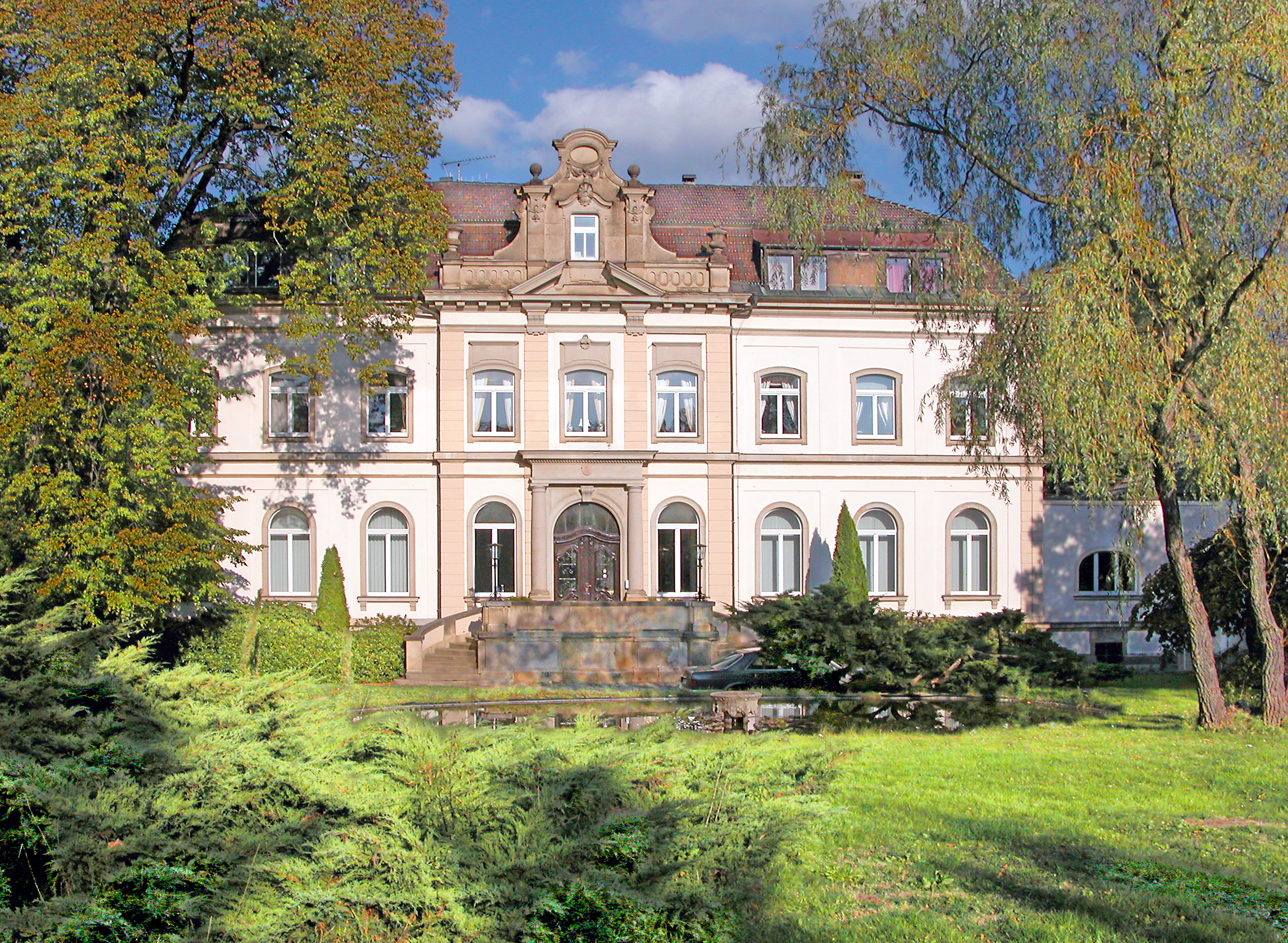 25.10.2006 01458 Medingen (Ottendorf-Okrilla), Dorfstraße (GMP: 51.183398,13.791387): Schloß Medingen, Südseite. Die Wurzeln des Ritterguts Medingen reichen bis ins 13. Jahrhundert zurück. Nachdem der Vorgängerbau, ein barockes Herrenhaus, 1894 abgebrannt war, erbaute ab 1895 Hofrat Paul Mehnert das heute vorhandene Gebäude. [DSCN12262.TIF]20061025300DR.JPG(c)Blobelt